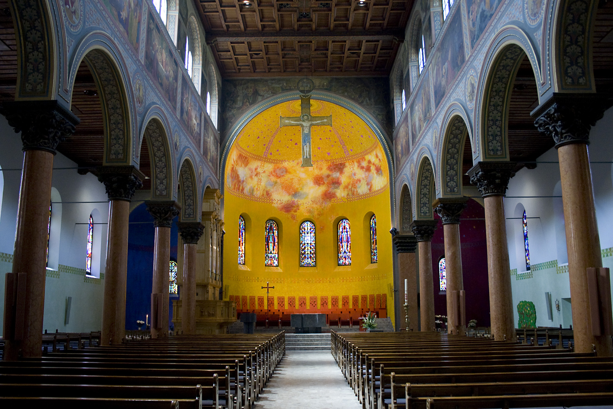 Innenraum Basilika, Dreifaltigkeitskirche Bern, Schweiz